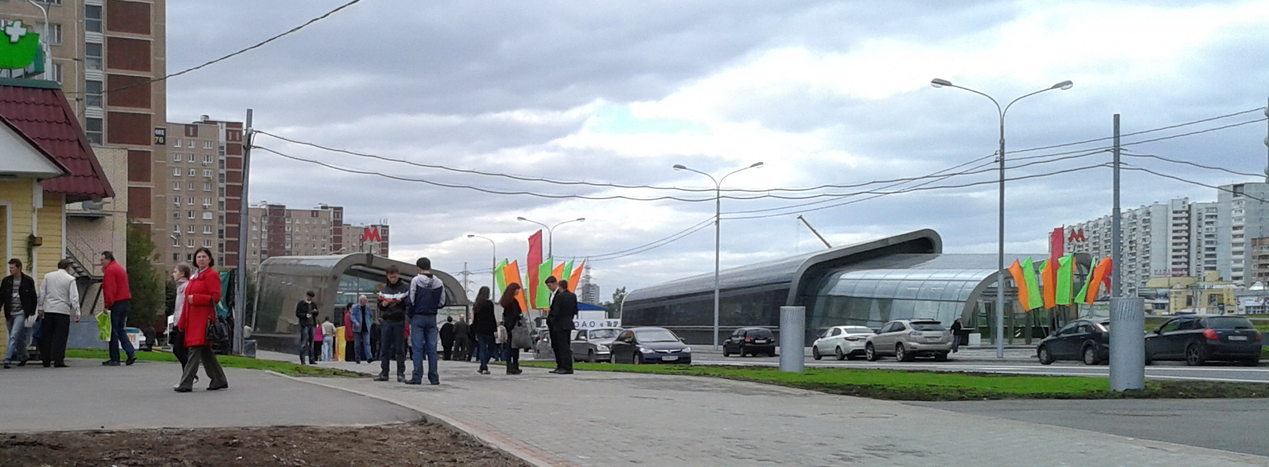 Ст. м. Новокосино, выход на Городецкую ул.